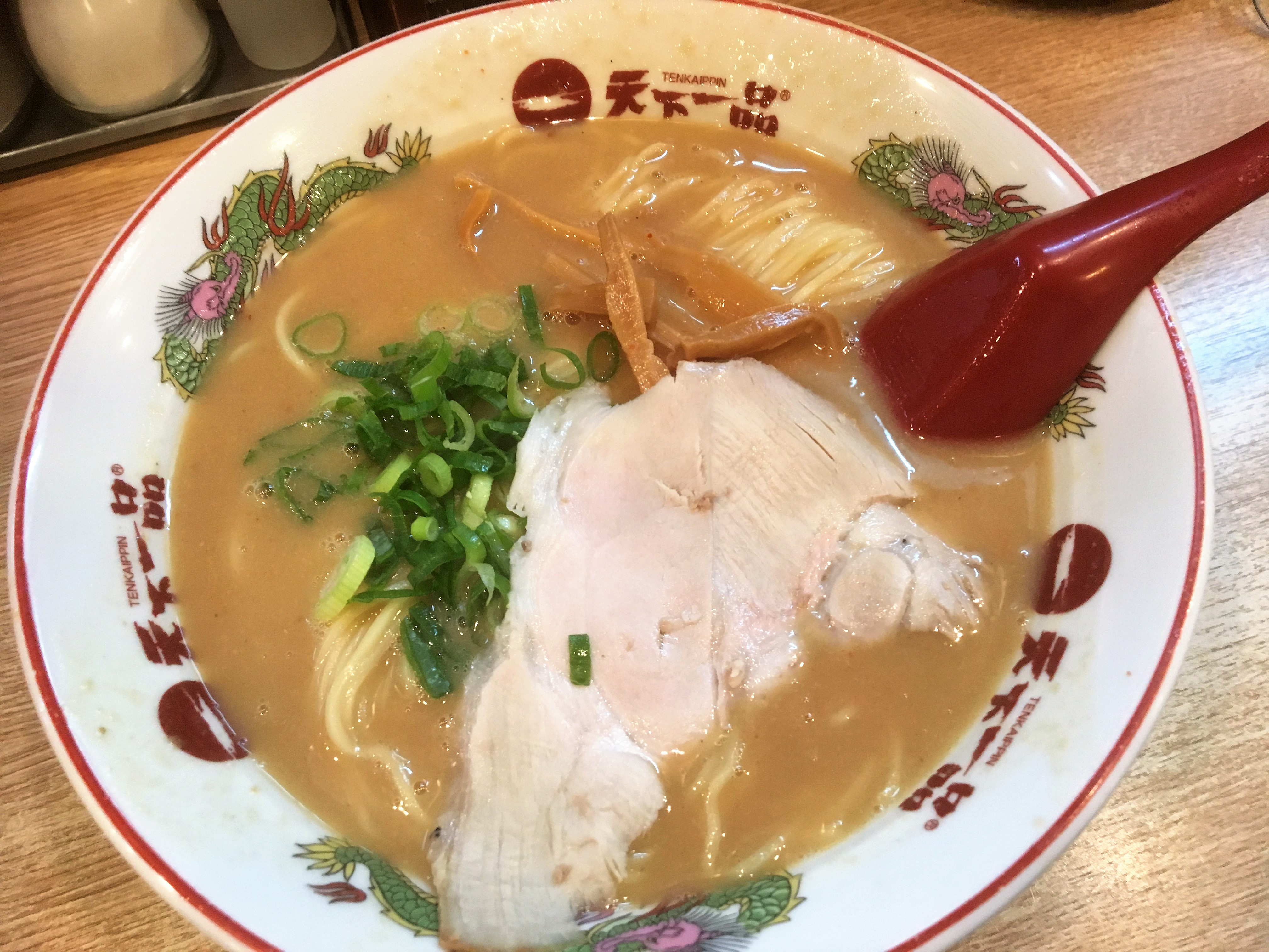 天下一品のラーメン。白い器も使用される。広島県福山市 光南店で撮影。2017年。